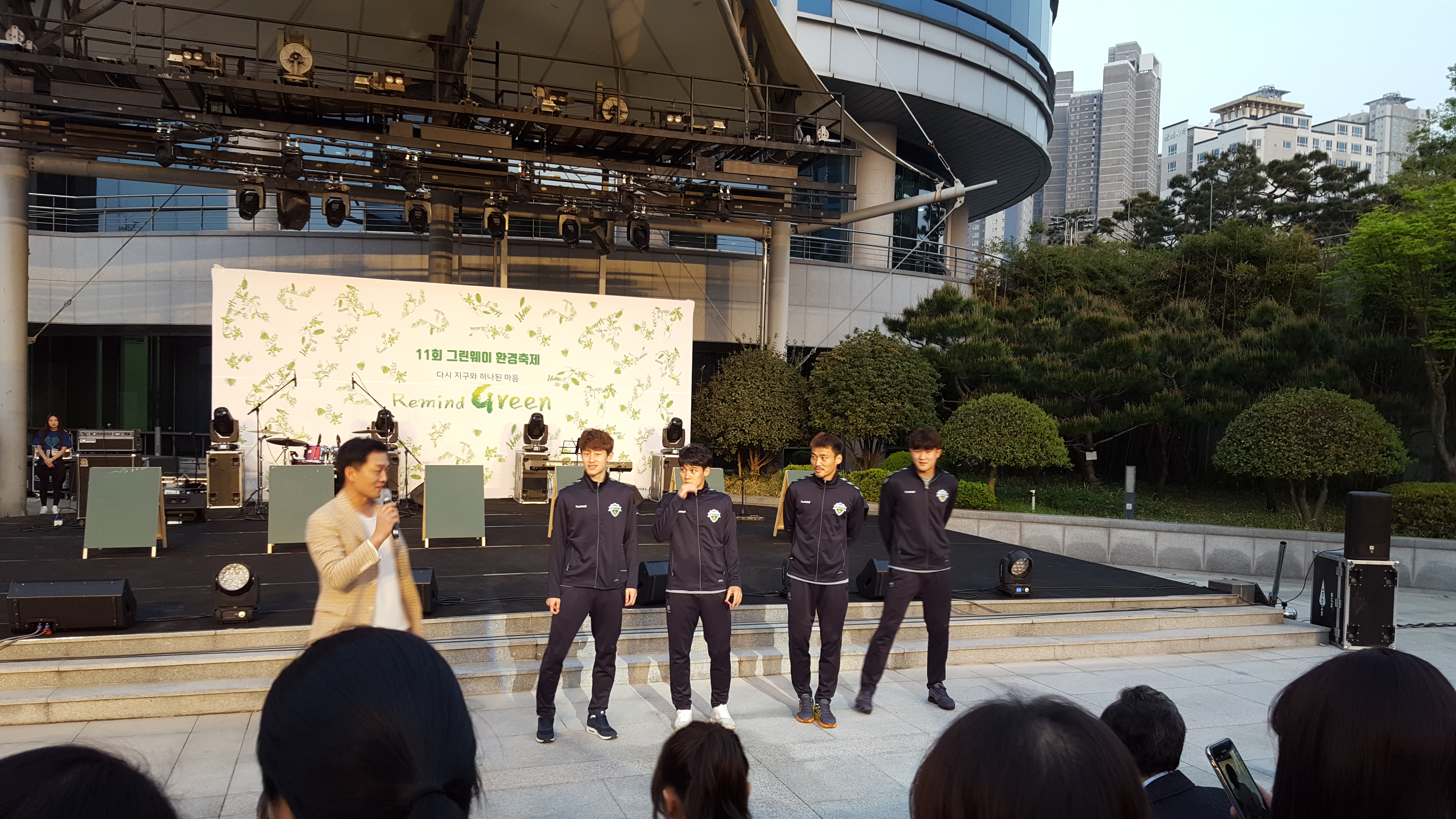 제 11회 그린웨이환경축제에 참가한 전북현대모스 FC 소속 선수들 (왼쪽부터 이재성, 최철순, 신형민, 김민재)